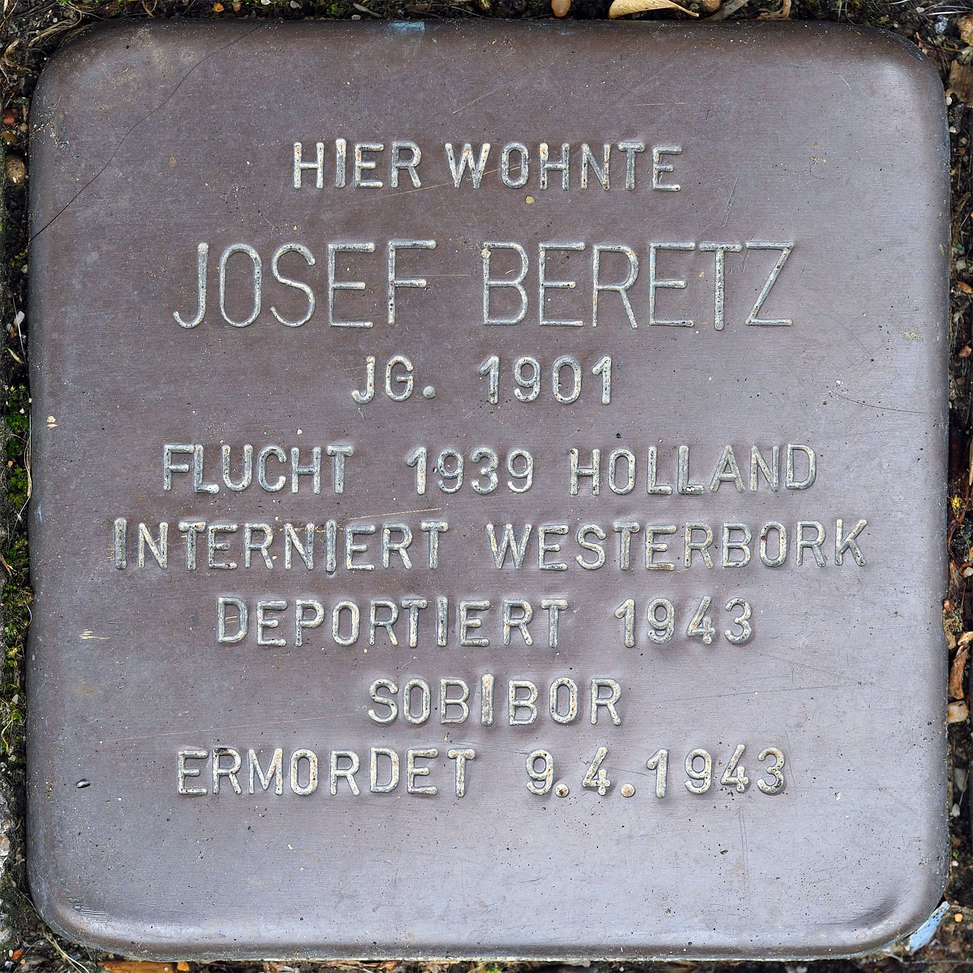 Stolpersteine GV: Beretz Josef